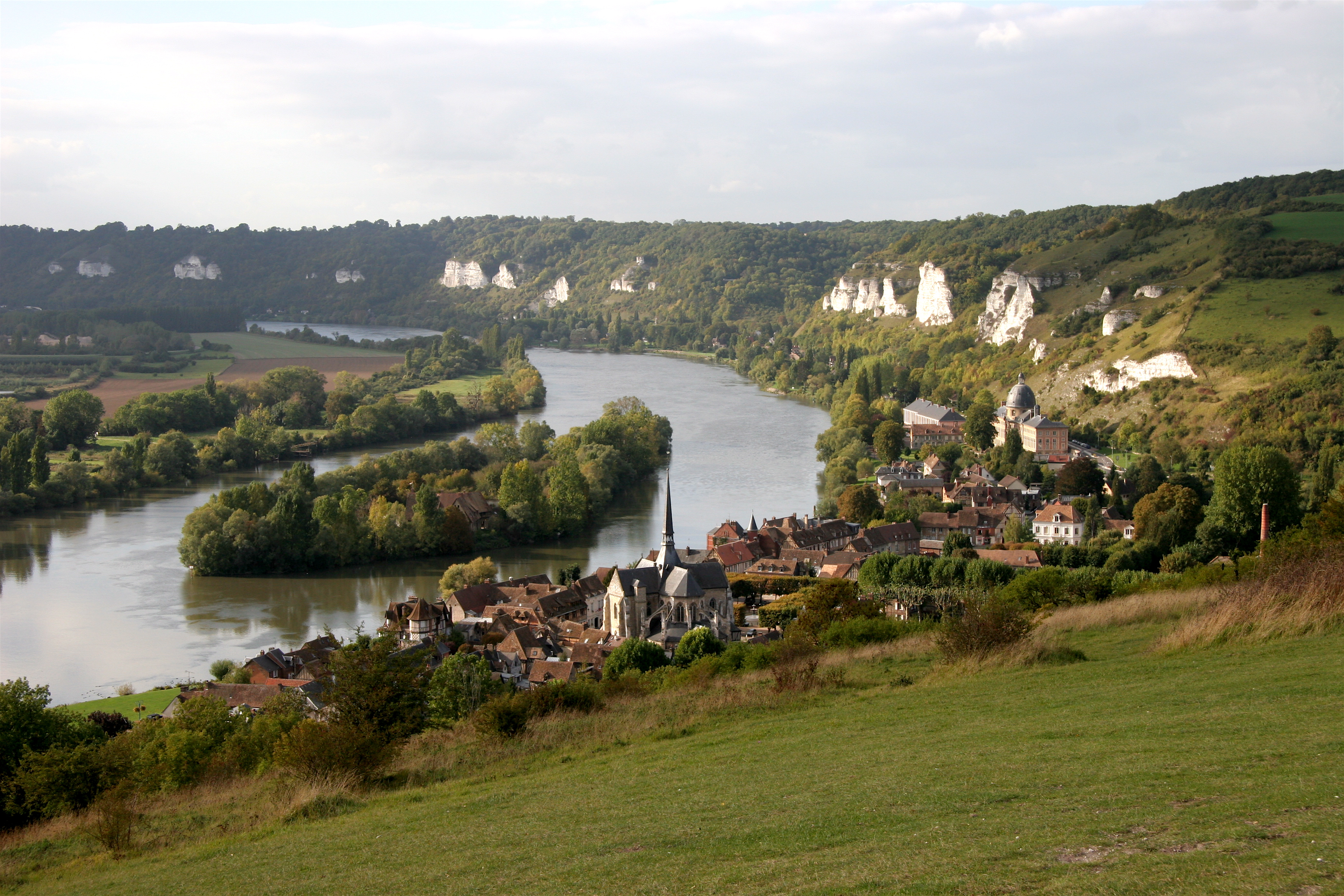 La Seine, le Petit-Andely (Les Andelys, quartier) et l'île du château, vus du Château-Gaillard, Eure, France.